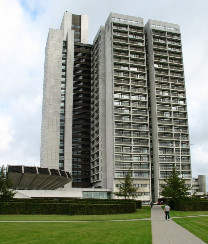 Københavns Amtssygehus Herlev (nu Herlev Hospital)